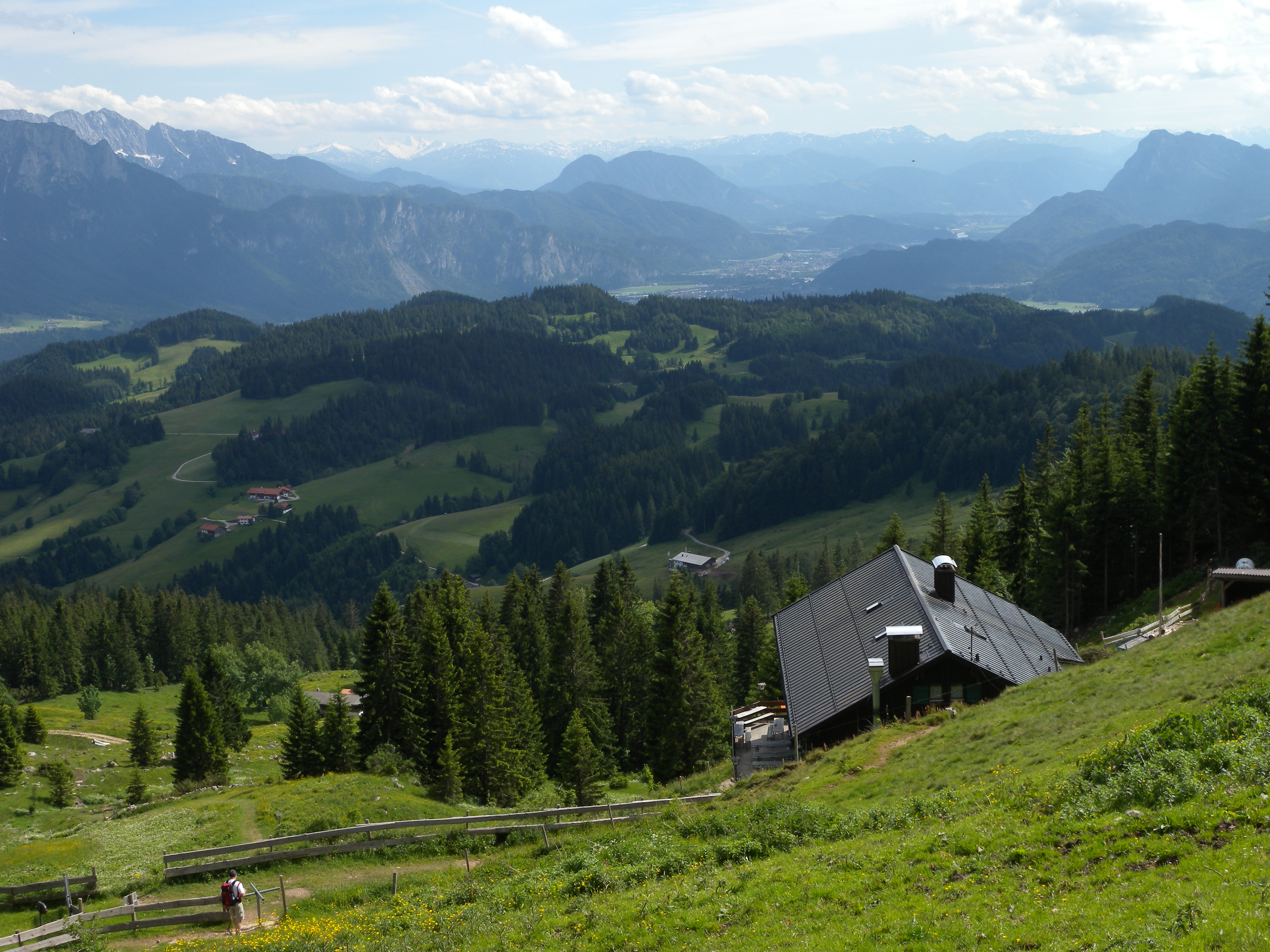 Über dem Spitzsteinhaus